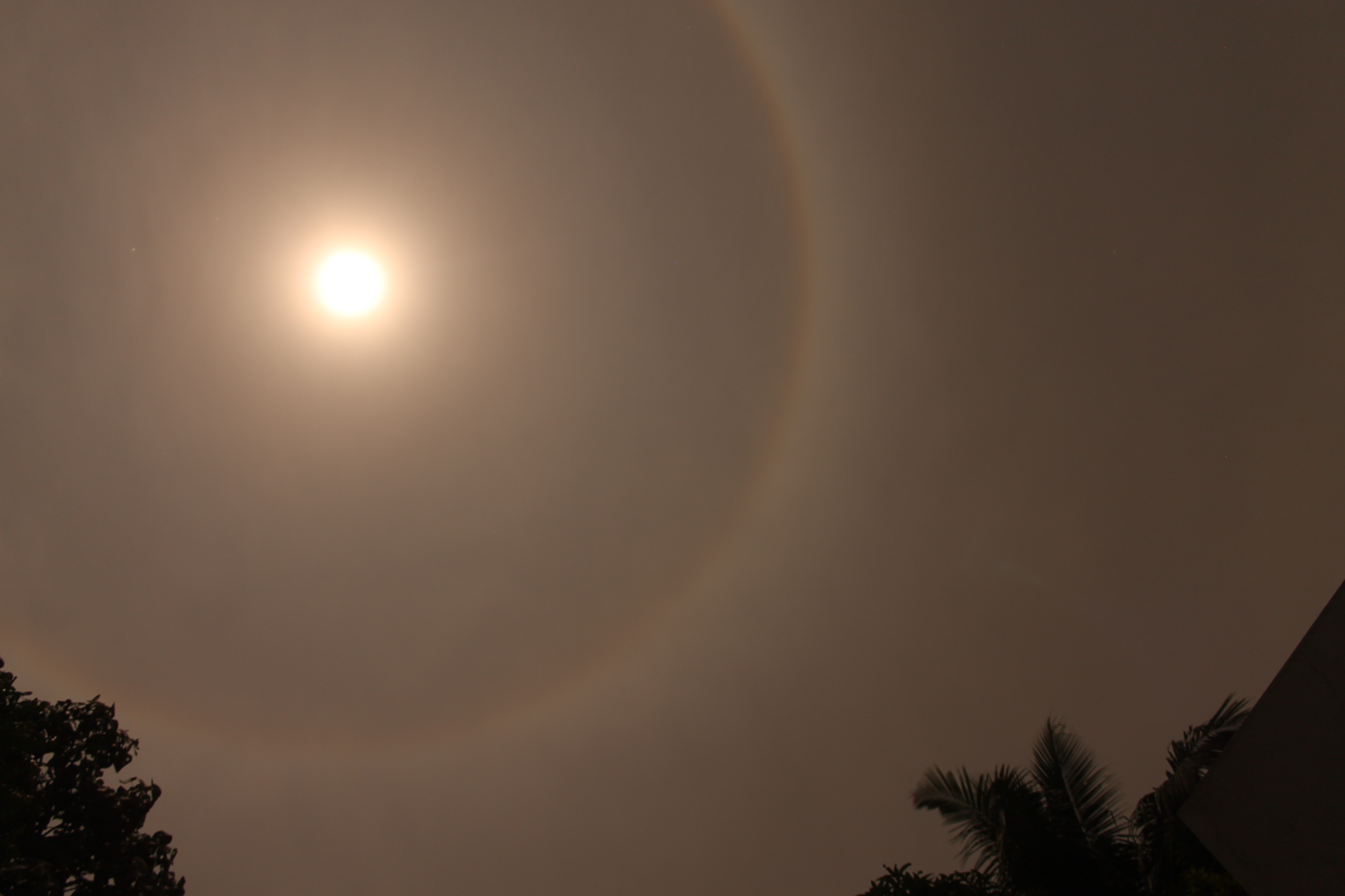 ചാന്ദ്രവലയം - അങ്കമാലിയില്‍ നിന്നുള്ള കാഴ്ച